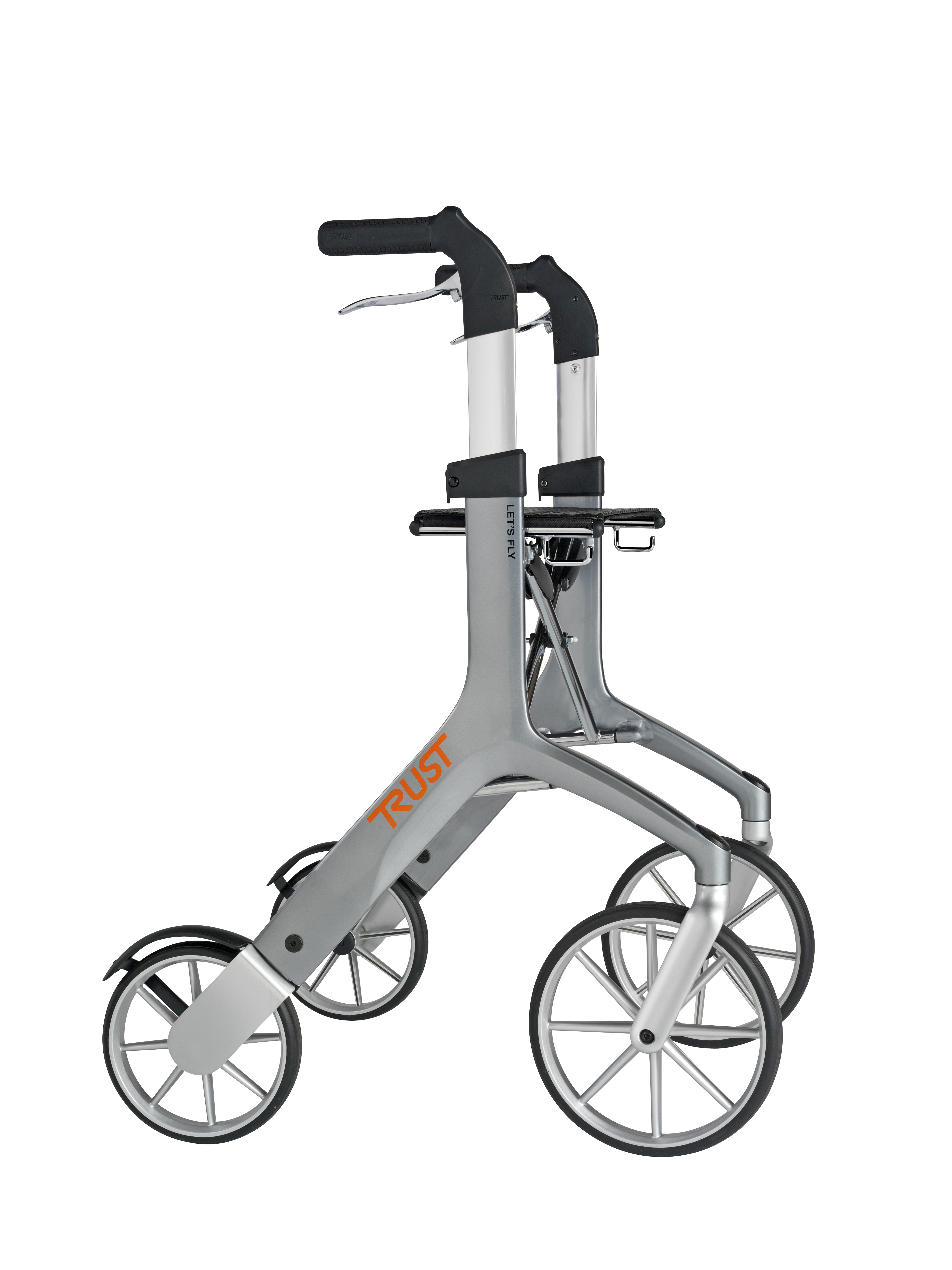 Rollator van het Zweedse merk Trust Care. Een elegante mobiliteitsoplossing voor mensen die slecht te been zijn.